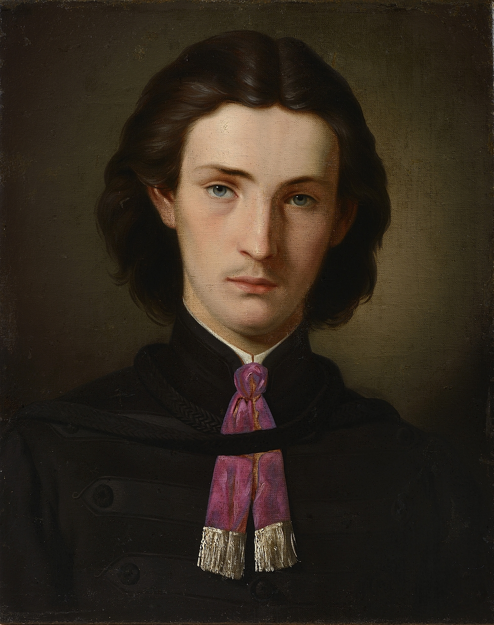 New Zealand artist Gottfried Bohumir Lindauer